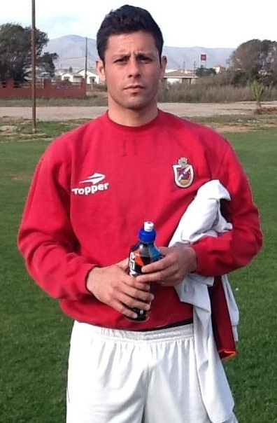 Eduardo Rubio Deportes La Serena